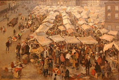 De Bossche markt met kramen waartussen talloze mensen lopen.